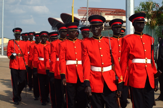 Soldiers